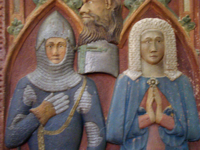 Epitaph des Hennel Landschad von Steinach († 1377) und seiner Gemahlin Mia von Sickingen in der evang. Kirche in Neckarsteinach